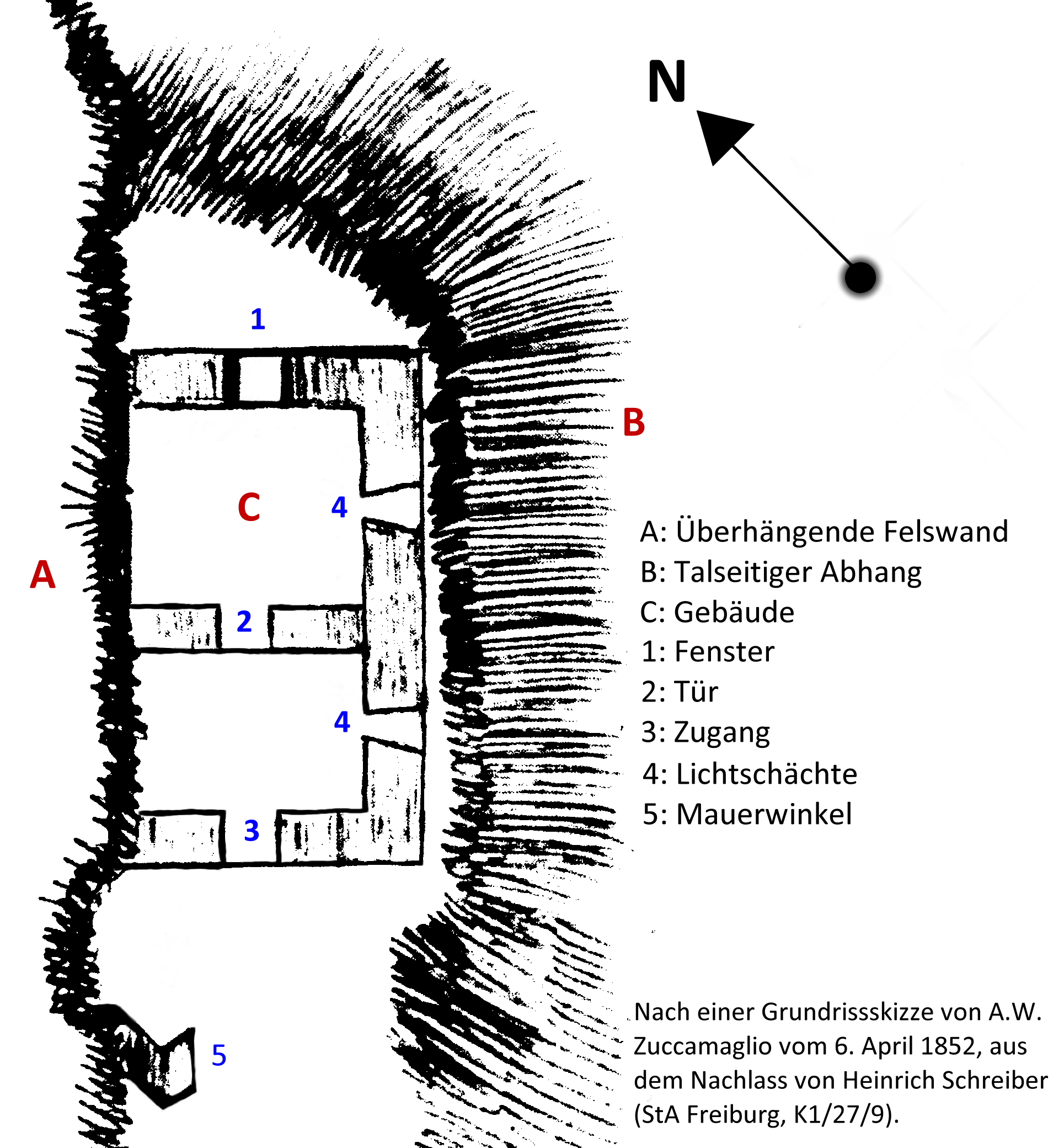 Nicht maßstabsgerechte Grundrissskizze des Bauwerks am Ölberg nach der Zeichnung von A.W. Zuccamaglio.